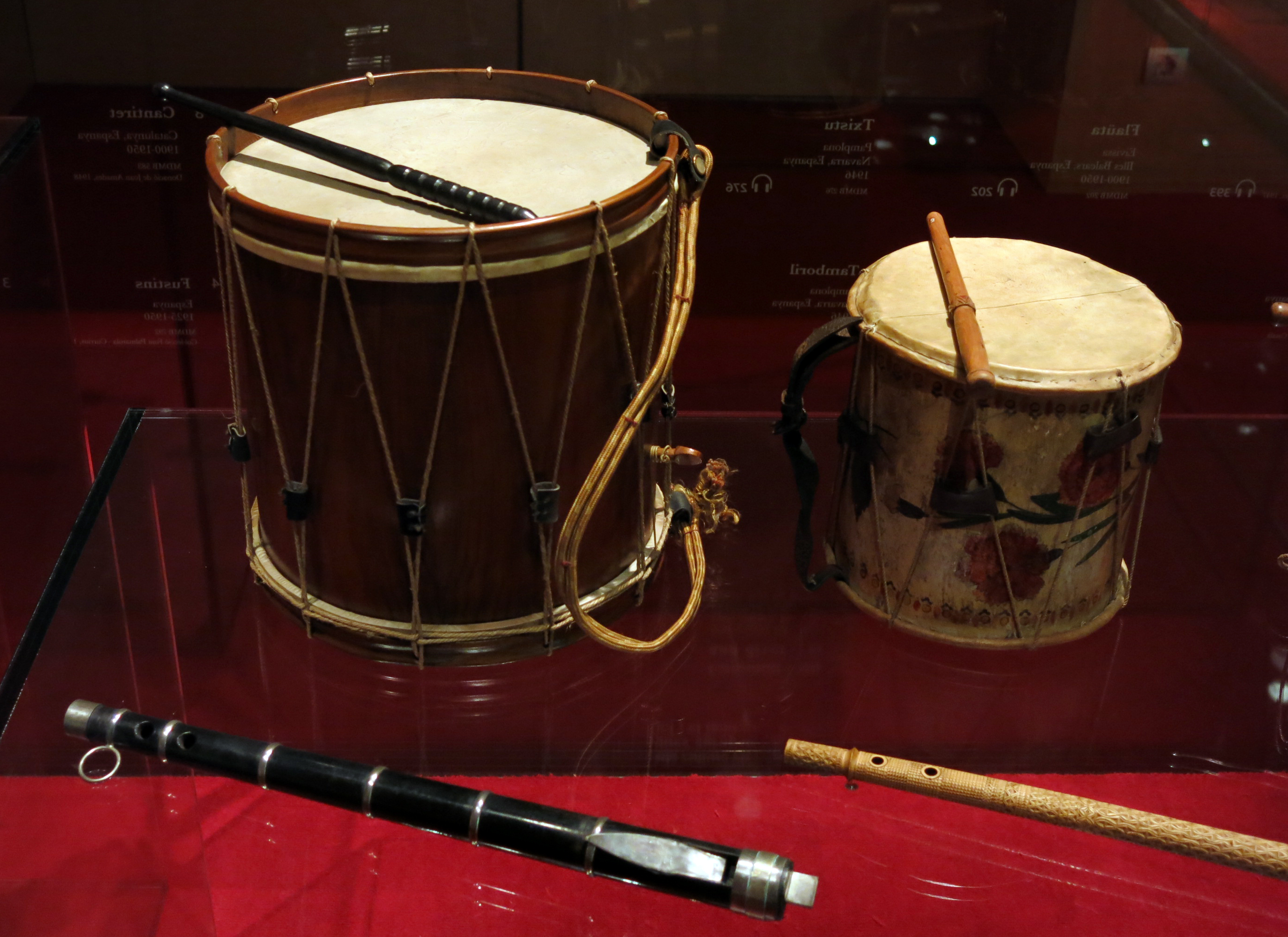 Tamboril. Pamplona. 1946. (MDMB 278)./ Tamborí. Eivissa.Primera meitat segle XX. (MDMB 160)./ Txistu. Pamplona. 1946. (MDMB 276)./ Flaüta. Eivissa. Primera meitat segle XX. (MDMB 202). Museu de la Música de Barcelona.